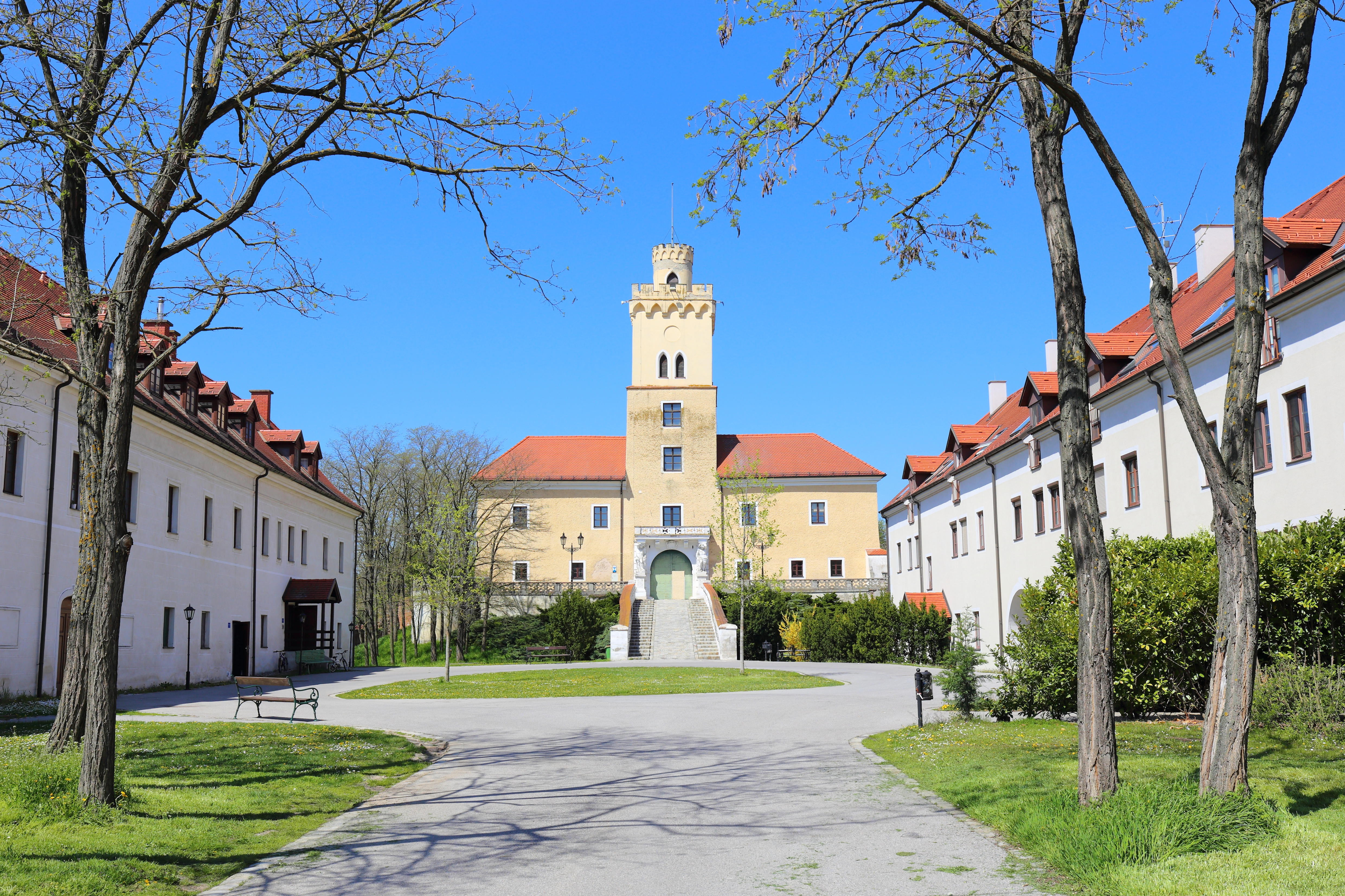 Südostansicht des Schlosses in Dürnkrut mit dem ehemaligen Meierhof im Vordergrund.Das vierflügige Wasserschloss wurde nach schweren Kriegsschäden in der ersten Hälfte des 16. Jahrhunderts weitgehendst neu errichtet. Der zweigeschossige Renaissancebau um einen quadratischen Hof ist teilweise von einem Wassergraben umgeben. Nachdem das Schloss 1830 in den Besitz der Familie Sachsen-Coburg-Gotha kam, erfolgte eine Neugestaltung des Torturmes; unter anderem mit der romantischen Zinnenbekrönung.Links im Bild der ehemalige Südflügel des Meierhofes. Er hat eine Kernsubstanz aus dem Anfang des 17. Jahrhunderts und wurde mehrfach verändert. Rechts im Bild ein Neubau, der im Erscheinungsbild dem ehemaligen Nordflügel des Meierhofes nachempfunden wurde.